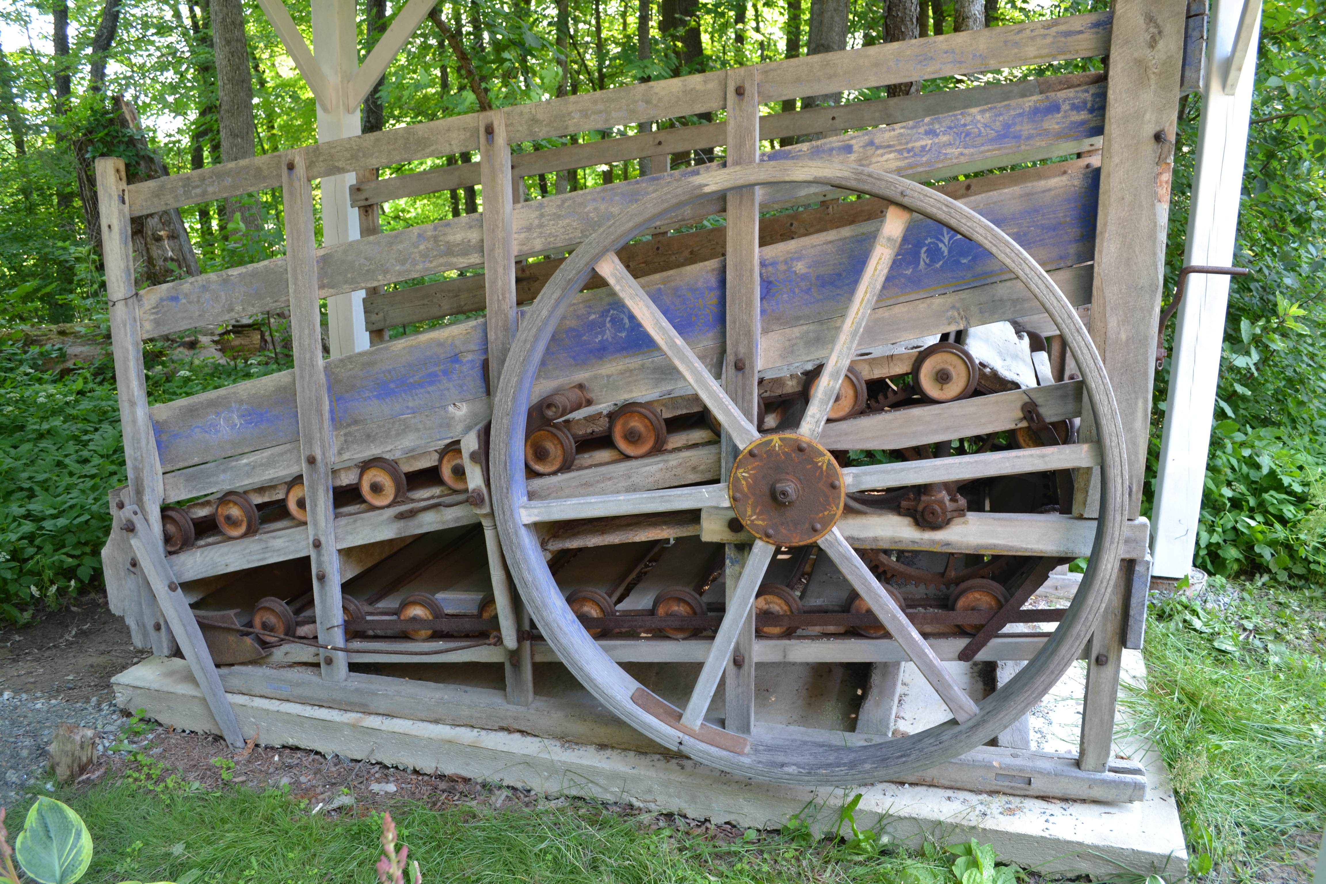 Trépigneuse du Centre culturel et du patrimoine Uplands dans l'arrondissement de Lennoxville à Sherbrooke, Québec.